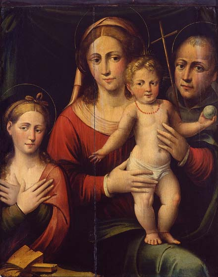 Virgen con niño y los santos Catalina y Antonio de Paduatitle QS:P1476,es:"Virgen con niño y los santos Catalina y Antonio de Padua" label QS:Les,"Virgen con niño y los santos Catalina y Antonio de Padua"